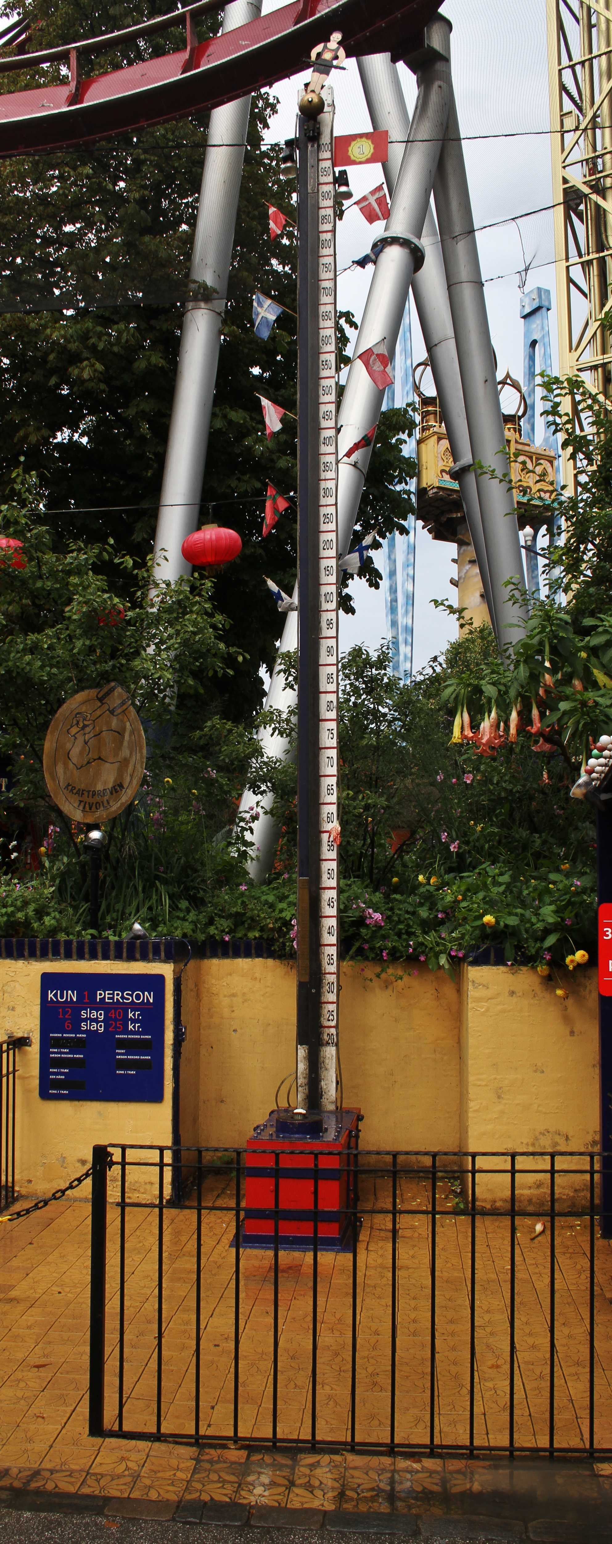 Kopenhagen,_Tivoli,_Hau_den_Lukas